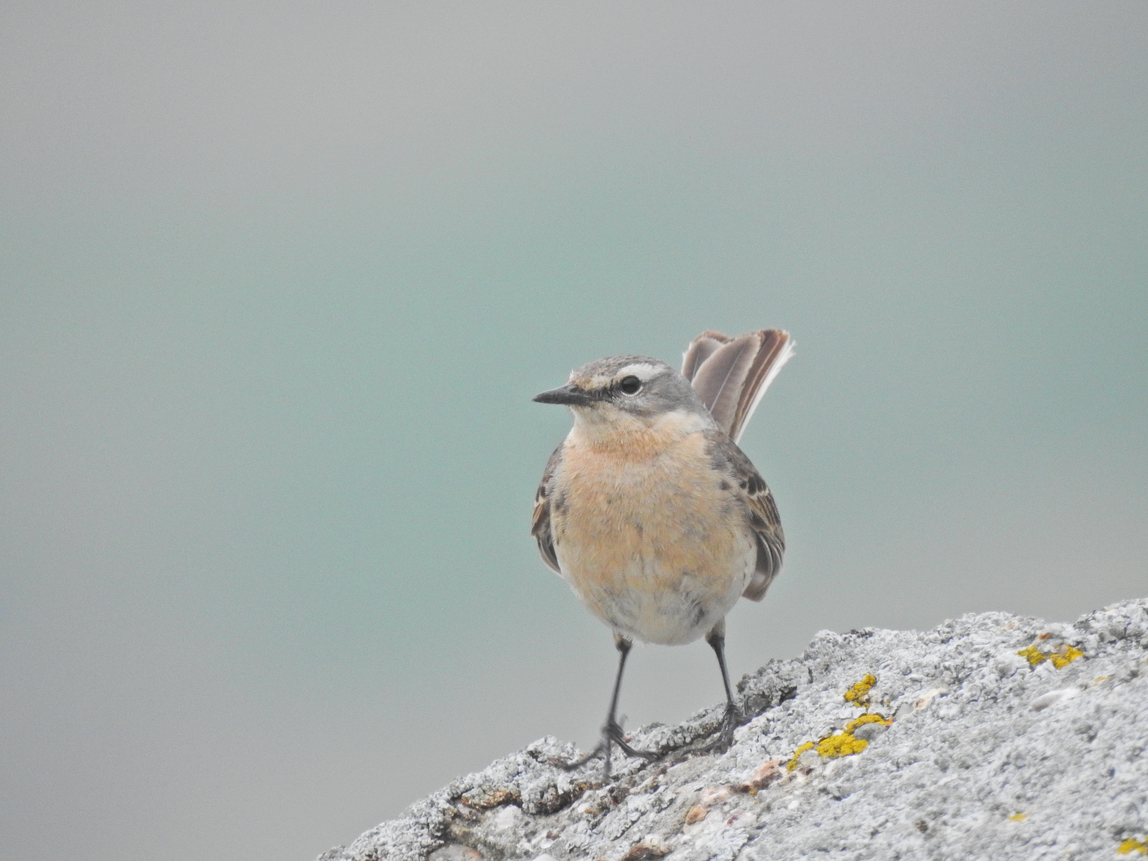 water pipit Bergpieper / Wasserpieper fâsă de munte